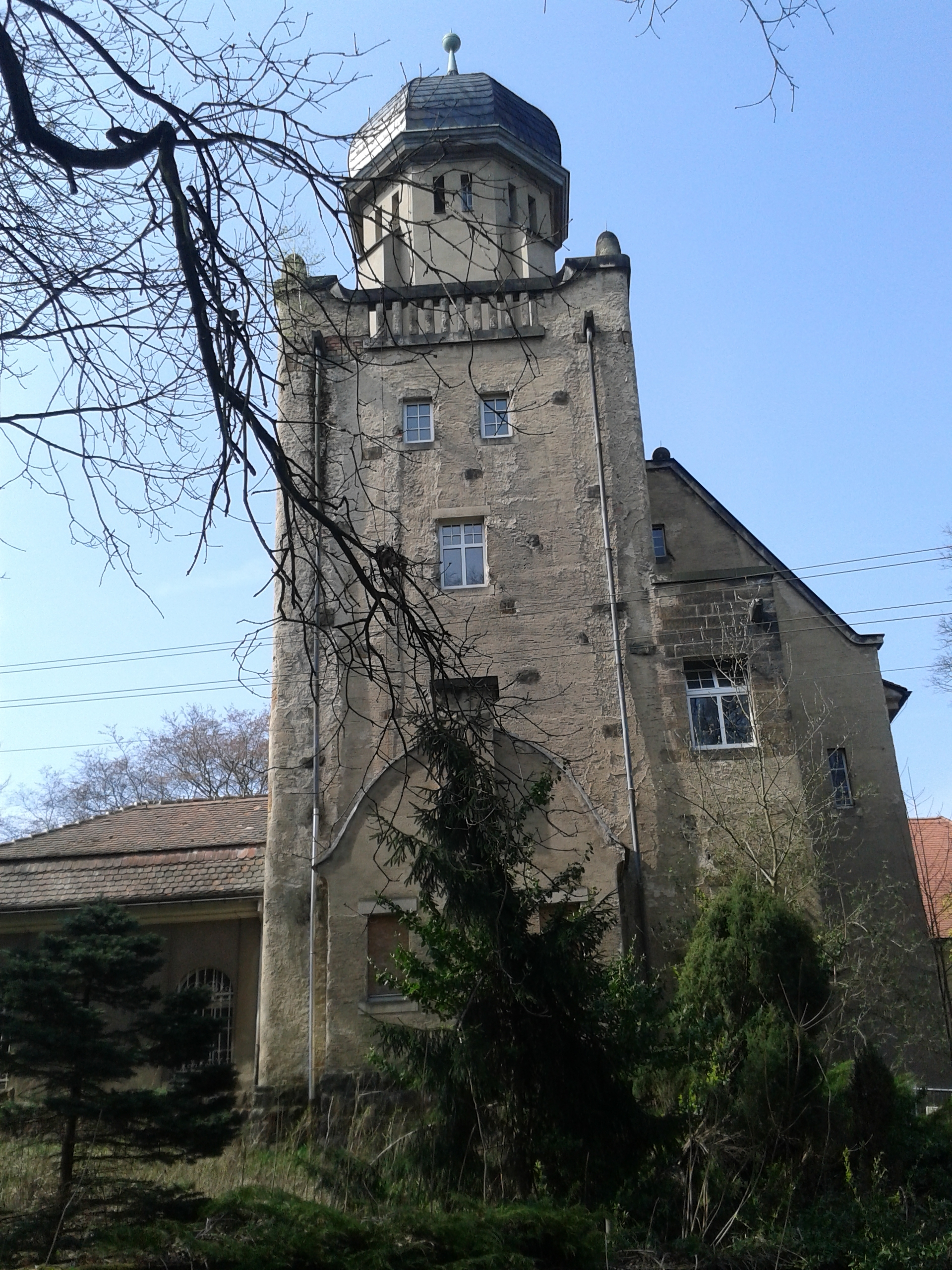 Schloss Struppen / Rittergut Neustruppen